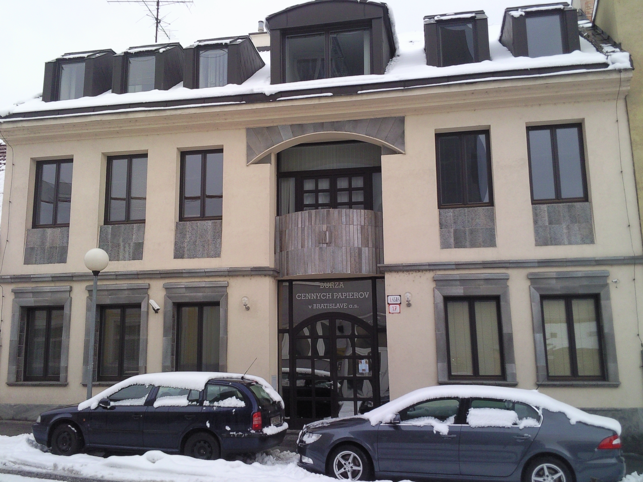 Bratislava Stock Exchange, Vysoká ulica (street). Bratislava